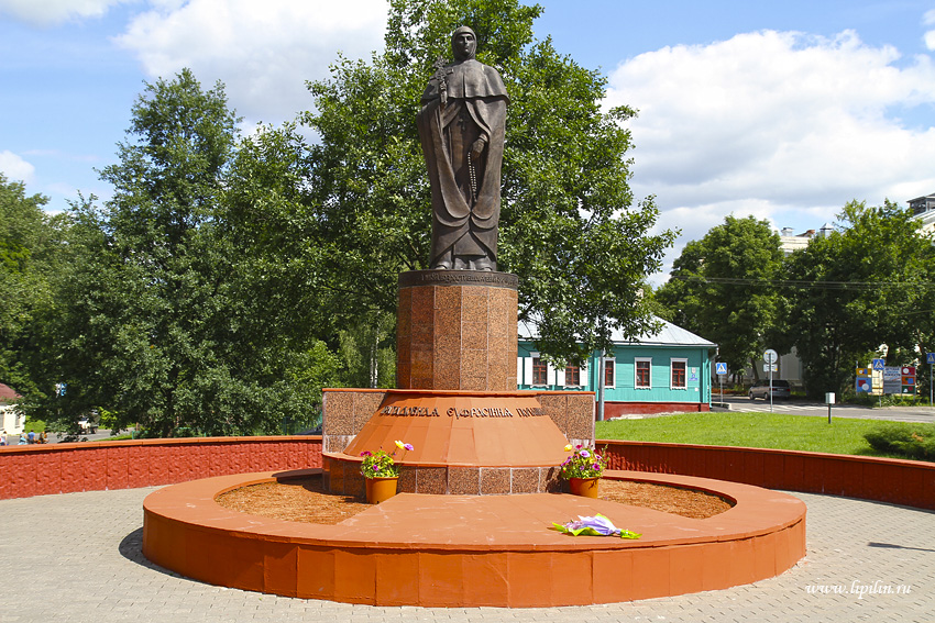 Полацк. Помнік Ефрасінні Полацкай